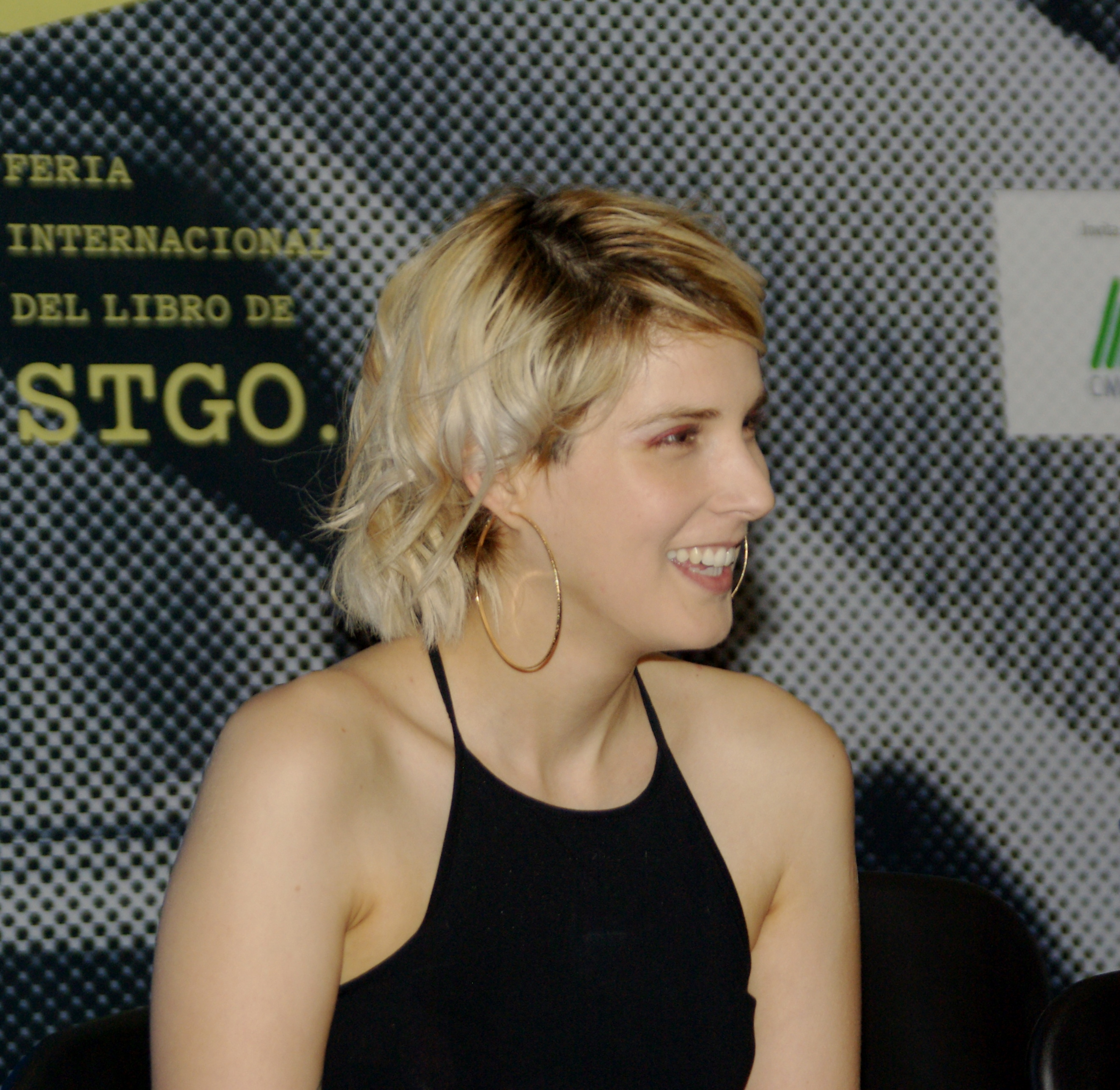 La escritora chilena Paulina Flores en la Feria Internacional del Libro de Santiago 2015